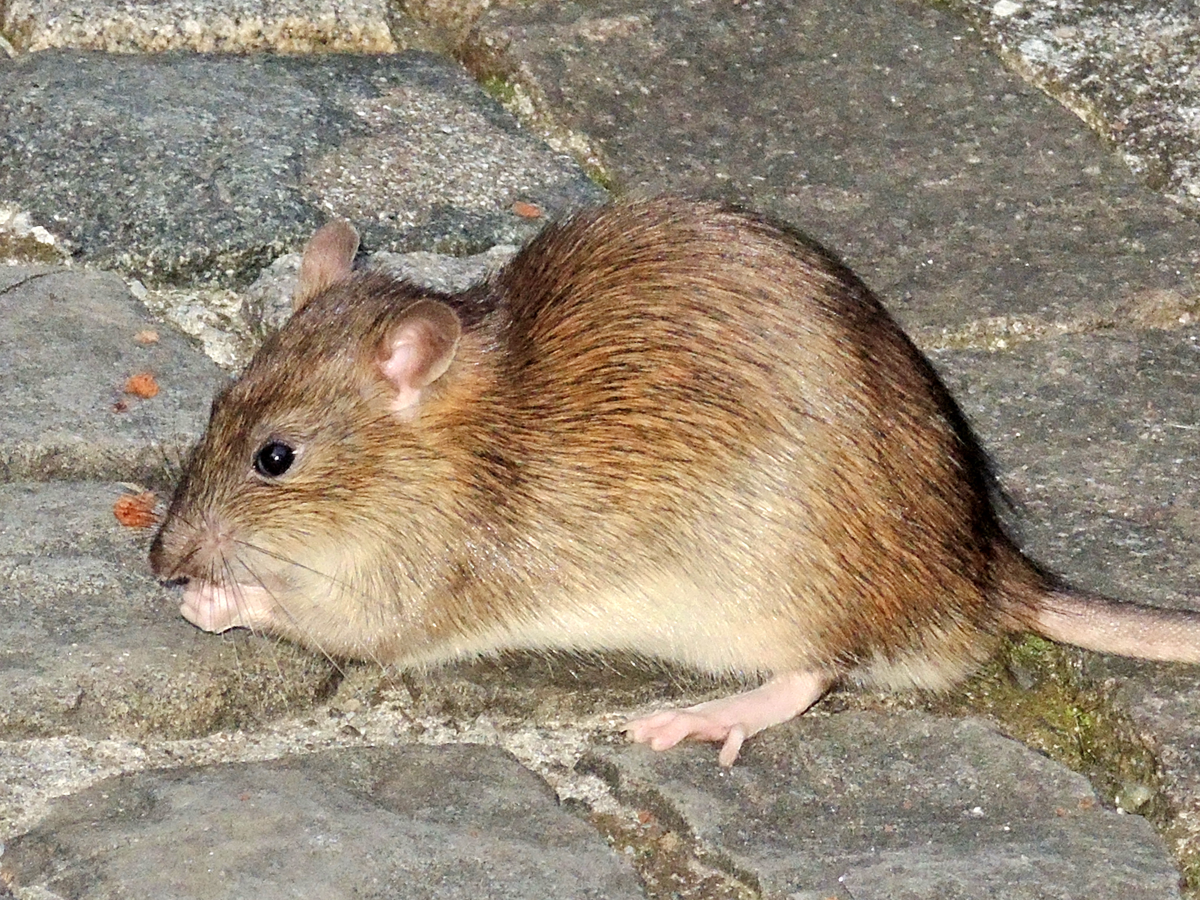 Arboretum in Zürich-Enge